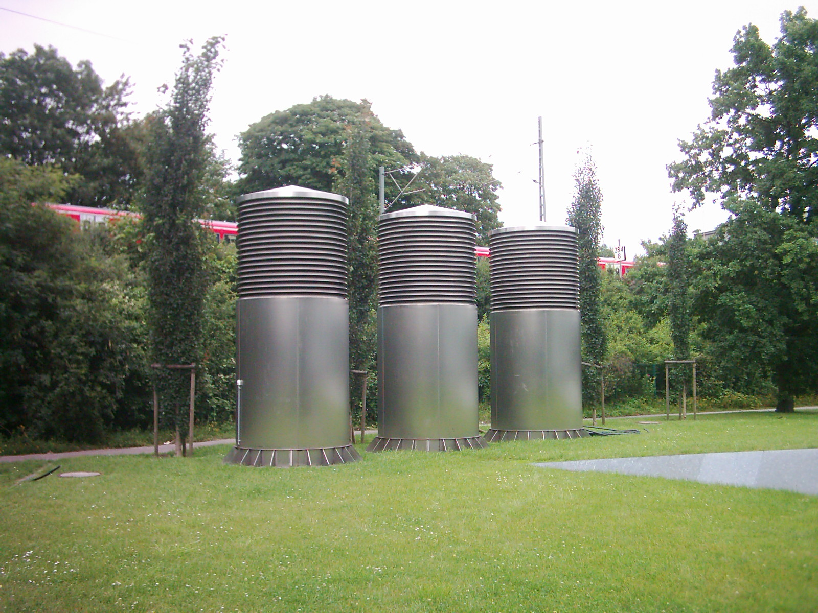 Abluftentsorgungstürme am Berliner Bogen in Hamburg-Hammerbrook.